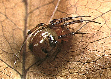 female Parasteatoda japonica from Okinawa.